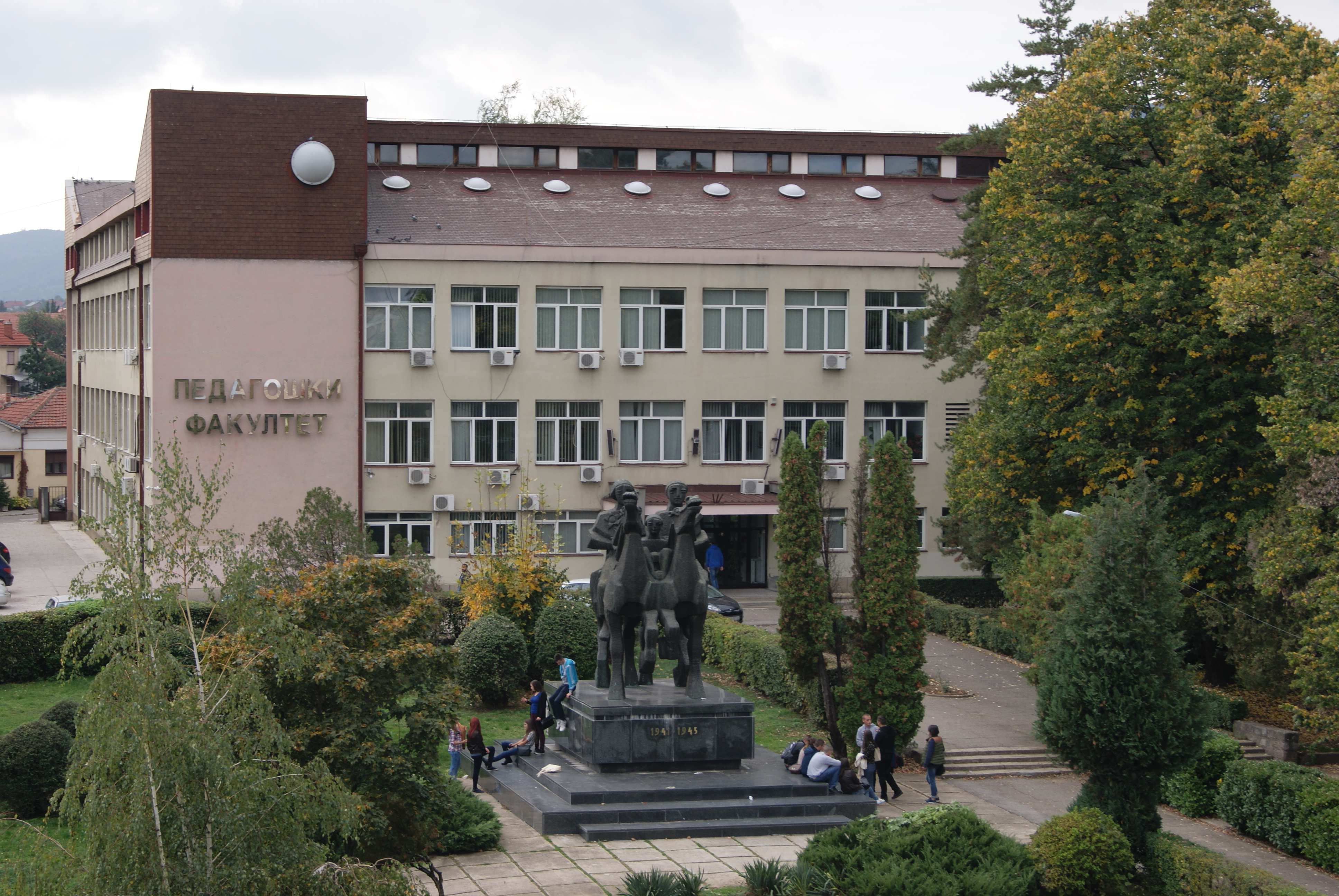 Педагошки факултет у Врању Licensing